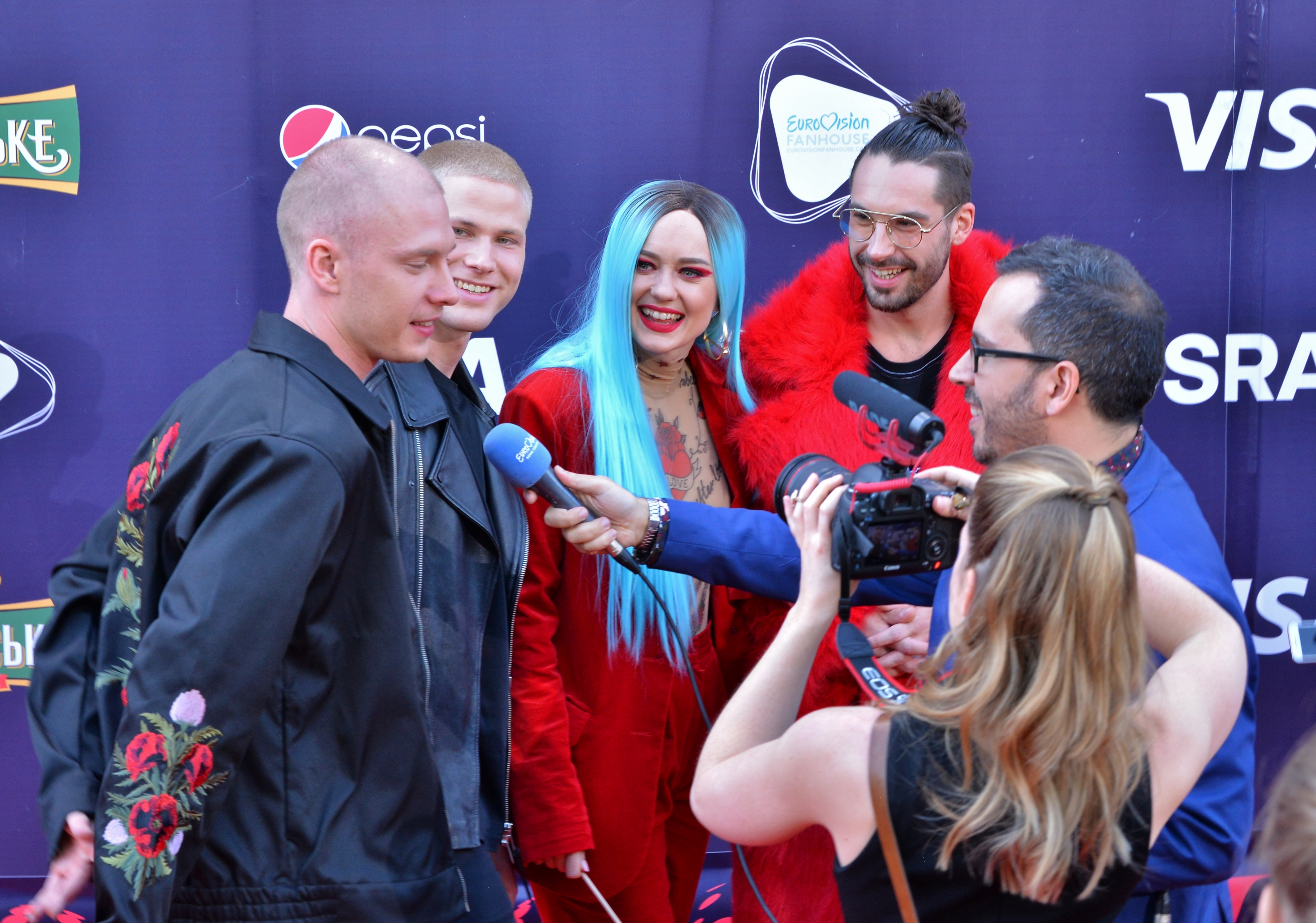 Латвійська група Triana Park на церемонії відкриття пісенного конкурсу Євробачення 2017 у Києві